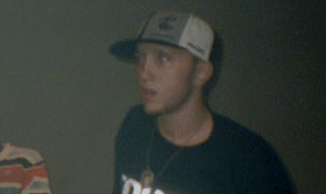 Foto van de Nederlandse rapper Kimo (uitsnede).